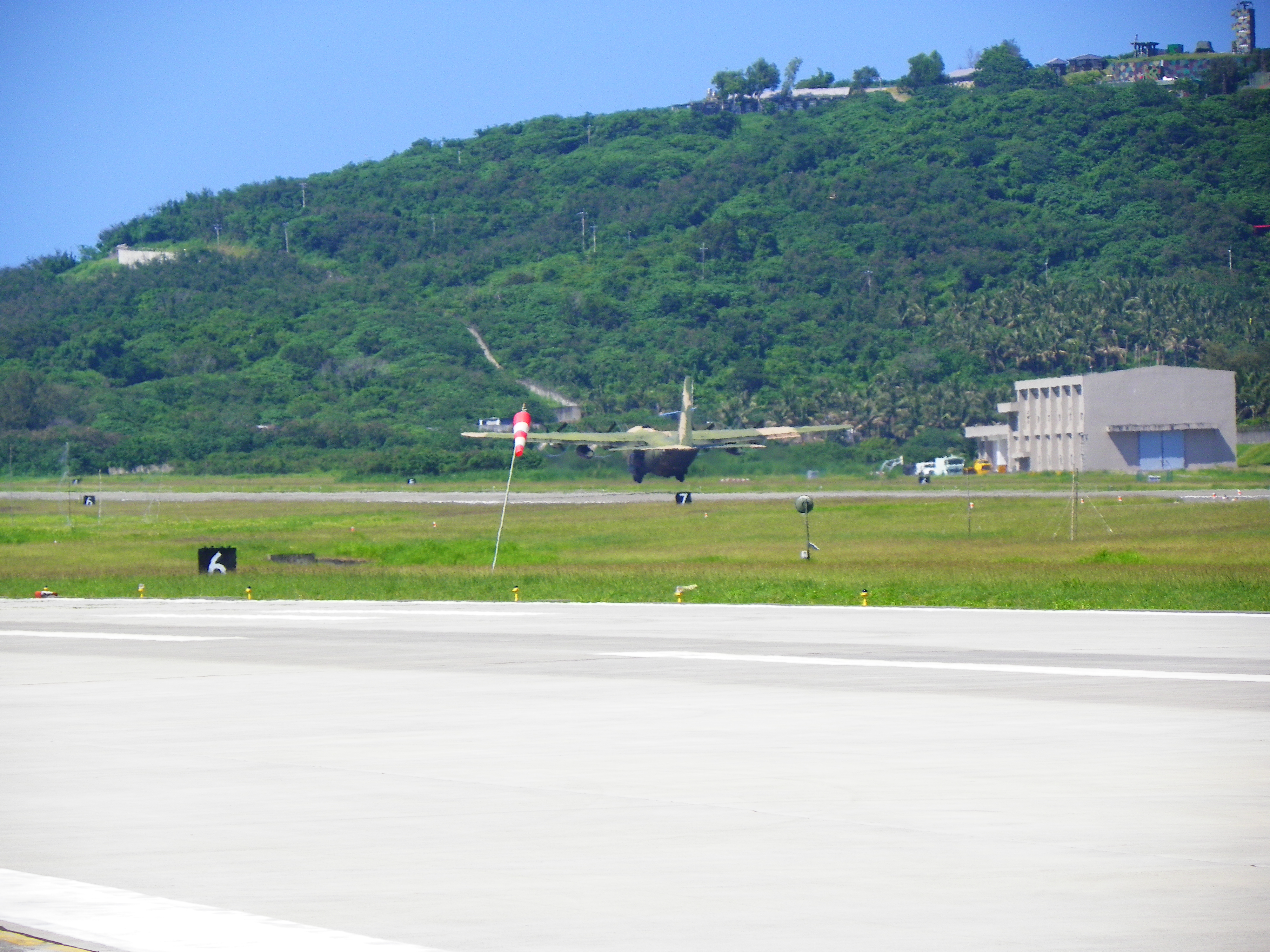 2013年6月1日下午，空軍C-130H運輸機1309由志航基地東側跑道起飛。